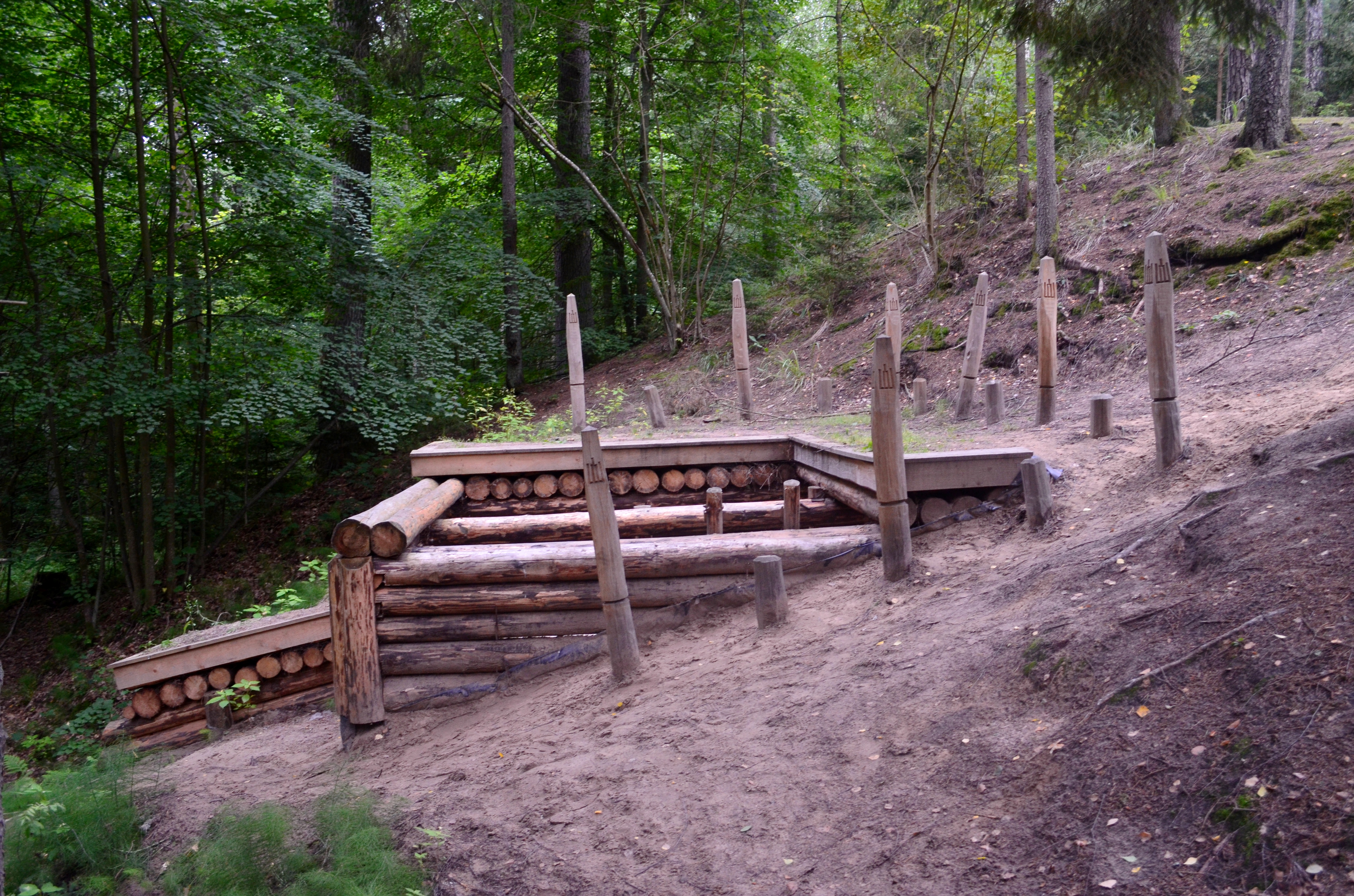 Partizanų bunkeris, Punios šilas, Alytaus raj.